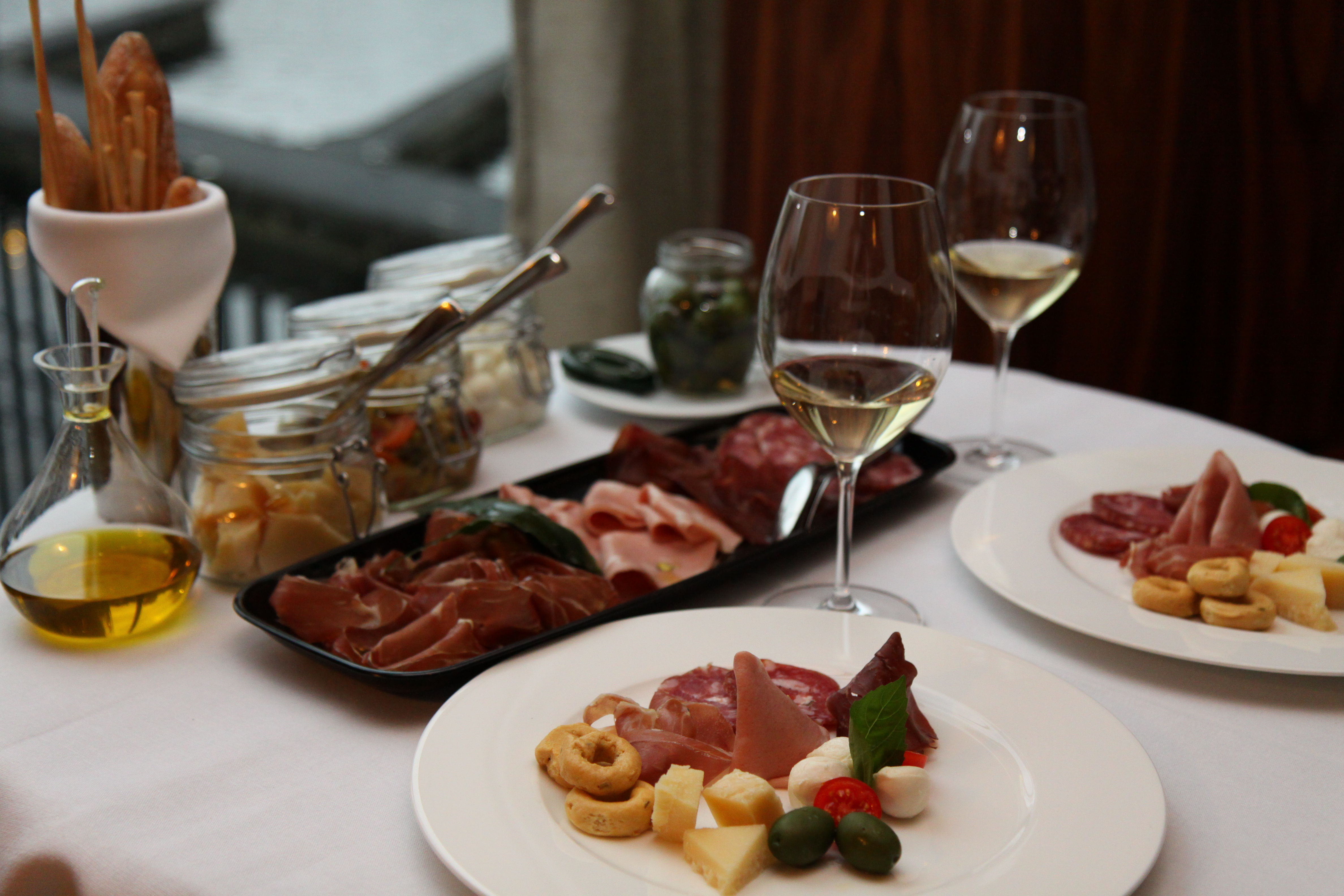 for FACILISSIMO